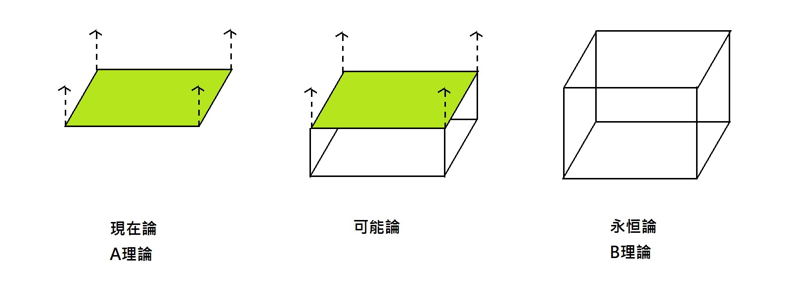 A-series and B-series in Chinese